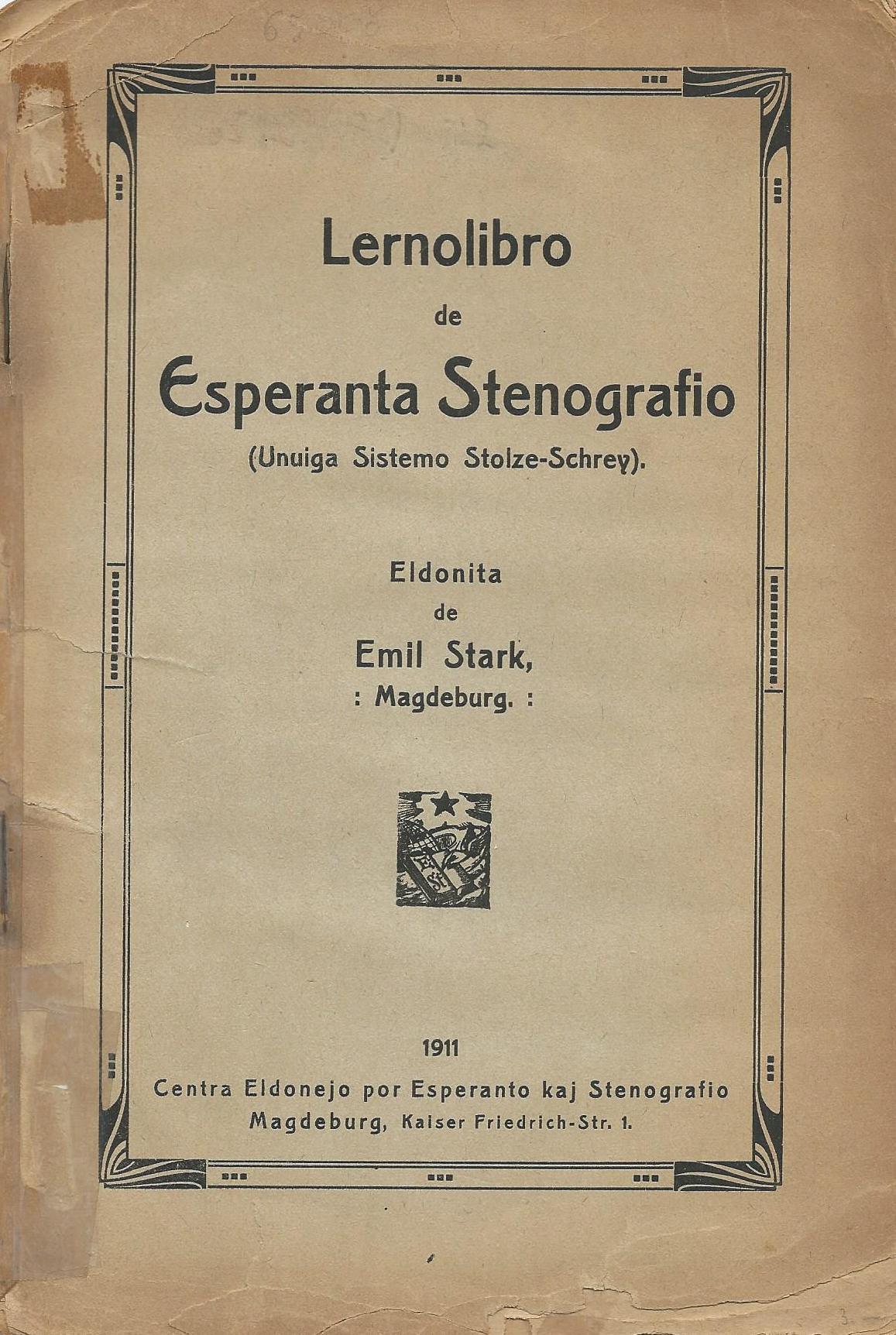 Lernolibro de Esperanta Stenografio, 1911